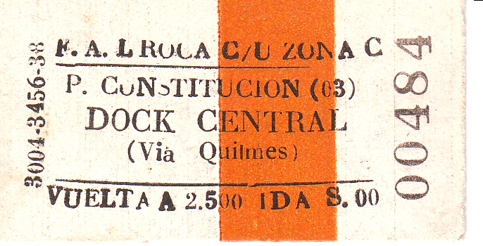 Boleto del Tren Roca utilizado en 1992